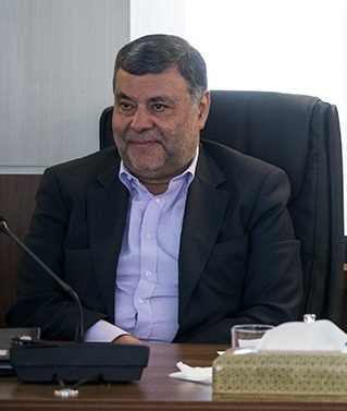 جلسه مجمع تشخیص مصلحت نظام، ۲ تیر ۱۳۹۷